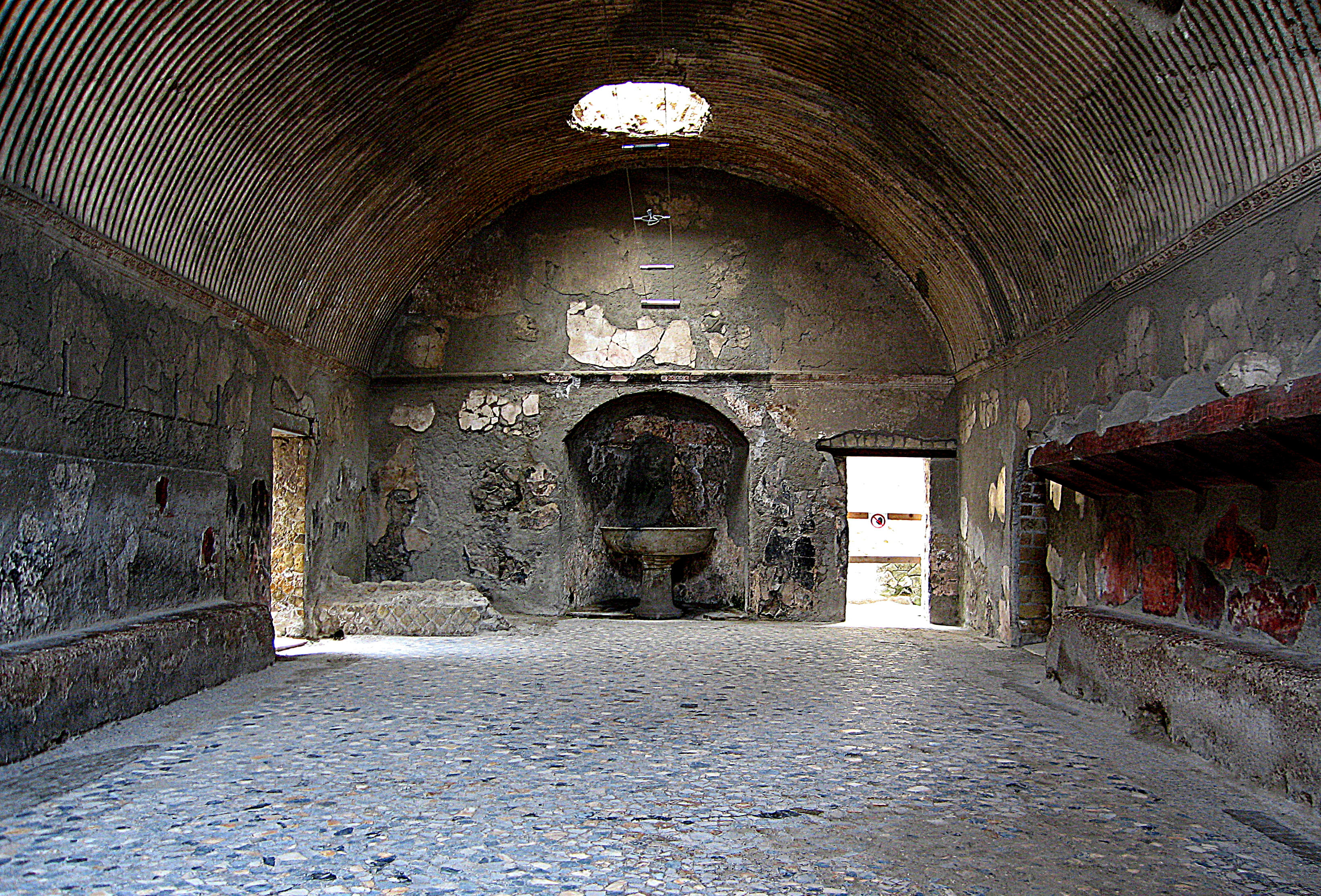 Terme maschili (Ercolano) - MIBAC This is a photo of a monument which is part of cultural heritage of Italy.